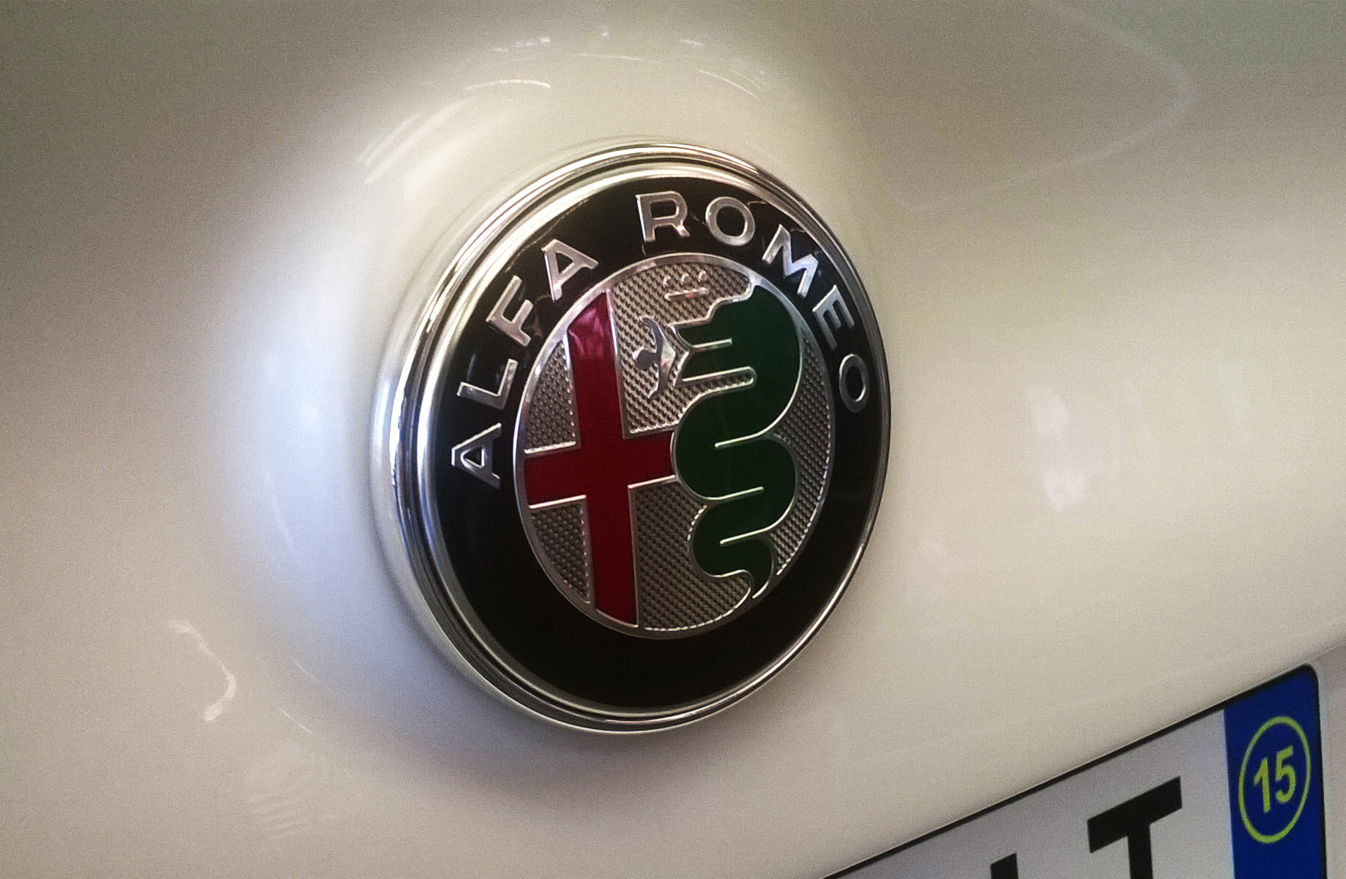 L' Alfa Romeo QV preserie bianca esposta ad Arese nel museo Storico Alfa Romeo in occasione dei 105 anni